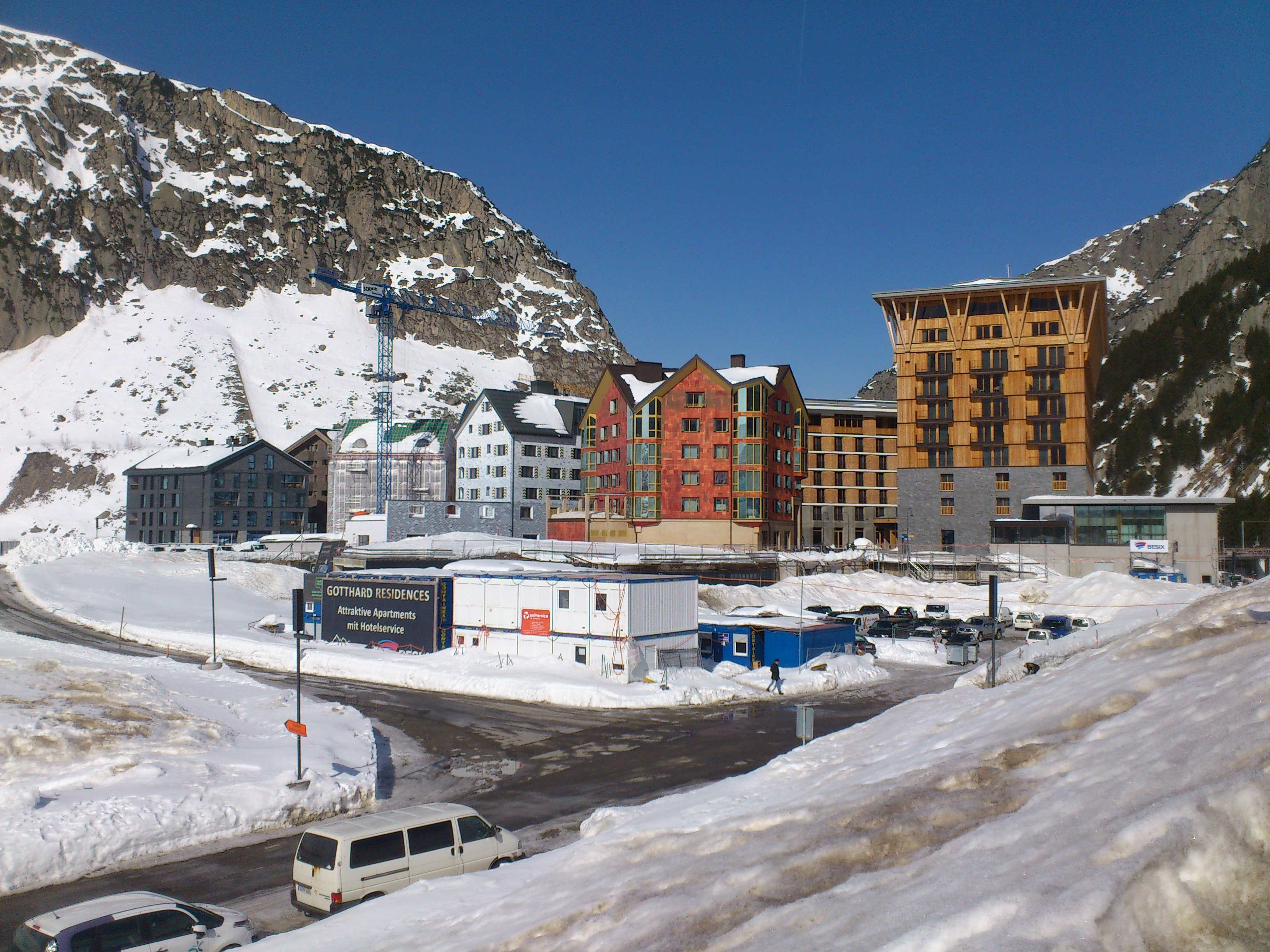 Andermatt (Schweiz): "Gotthard Residences" in Bau, Teil von "Andermatt Swiss Alps"